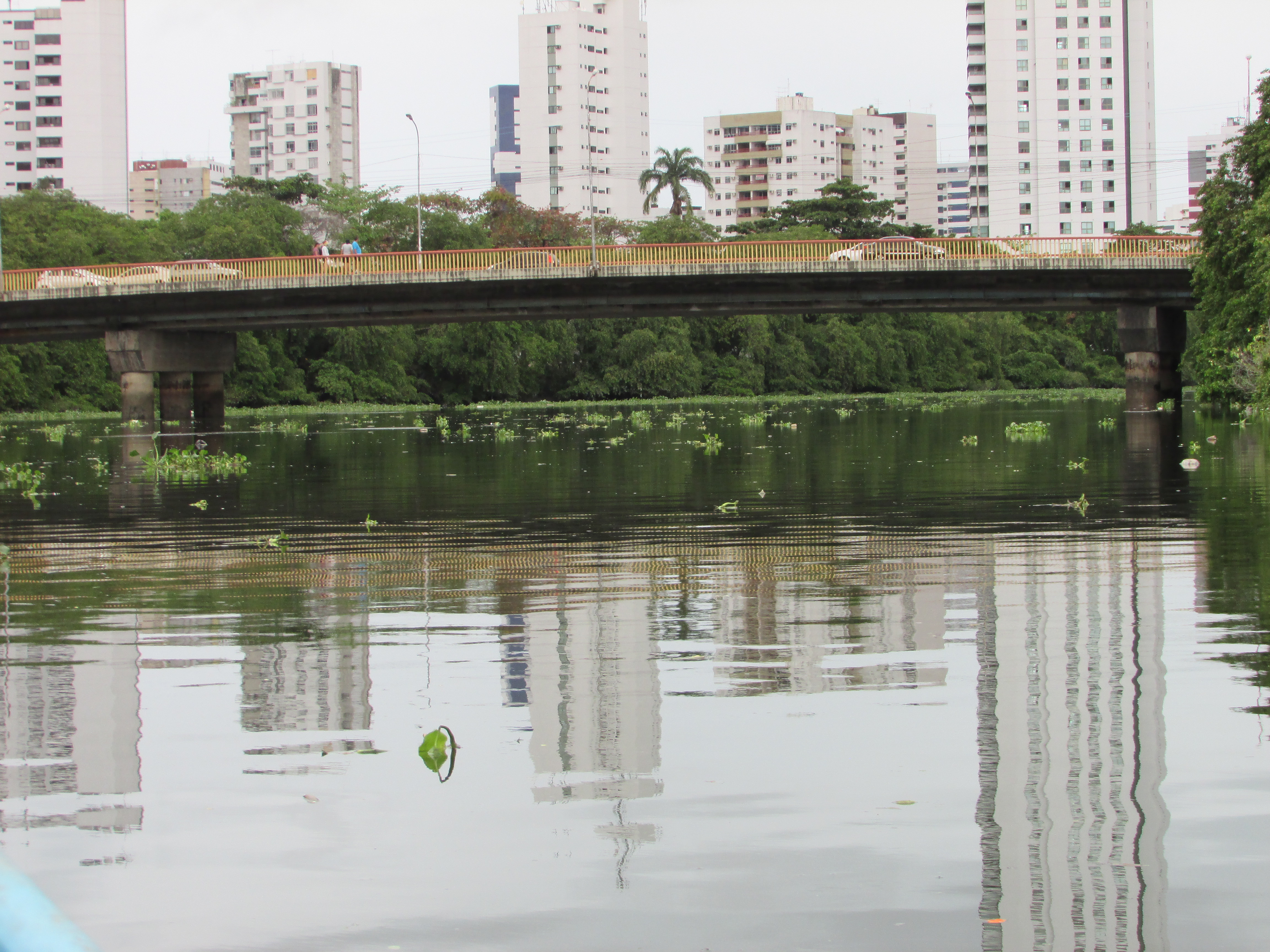 Ponte da Rua Amélia sobre o rio Capibaribe